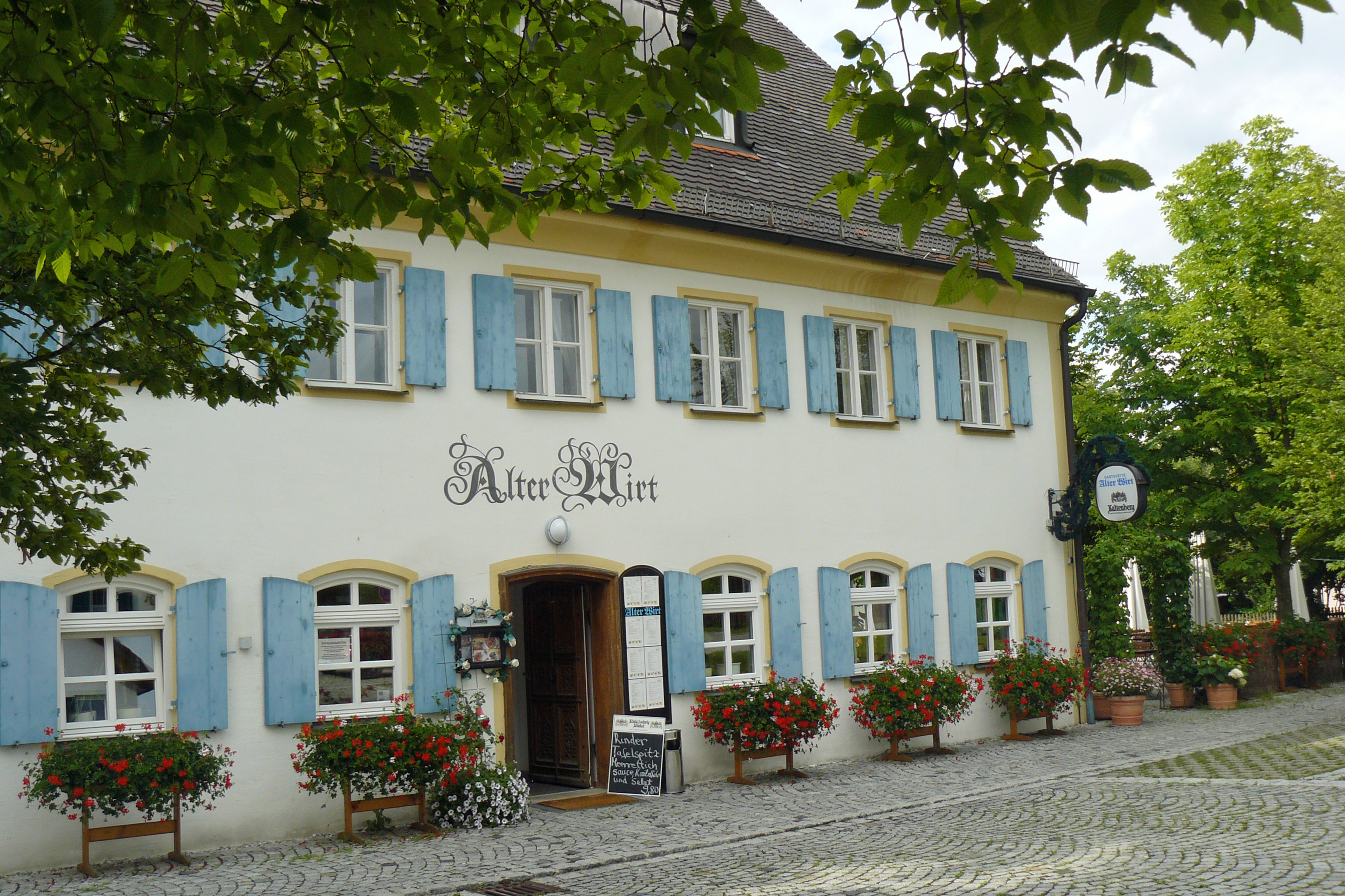 Gasthaus "Alter Wirt" in Geltendorf